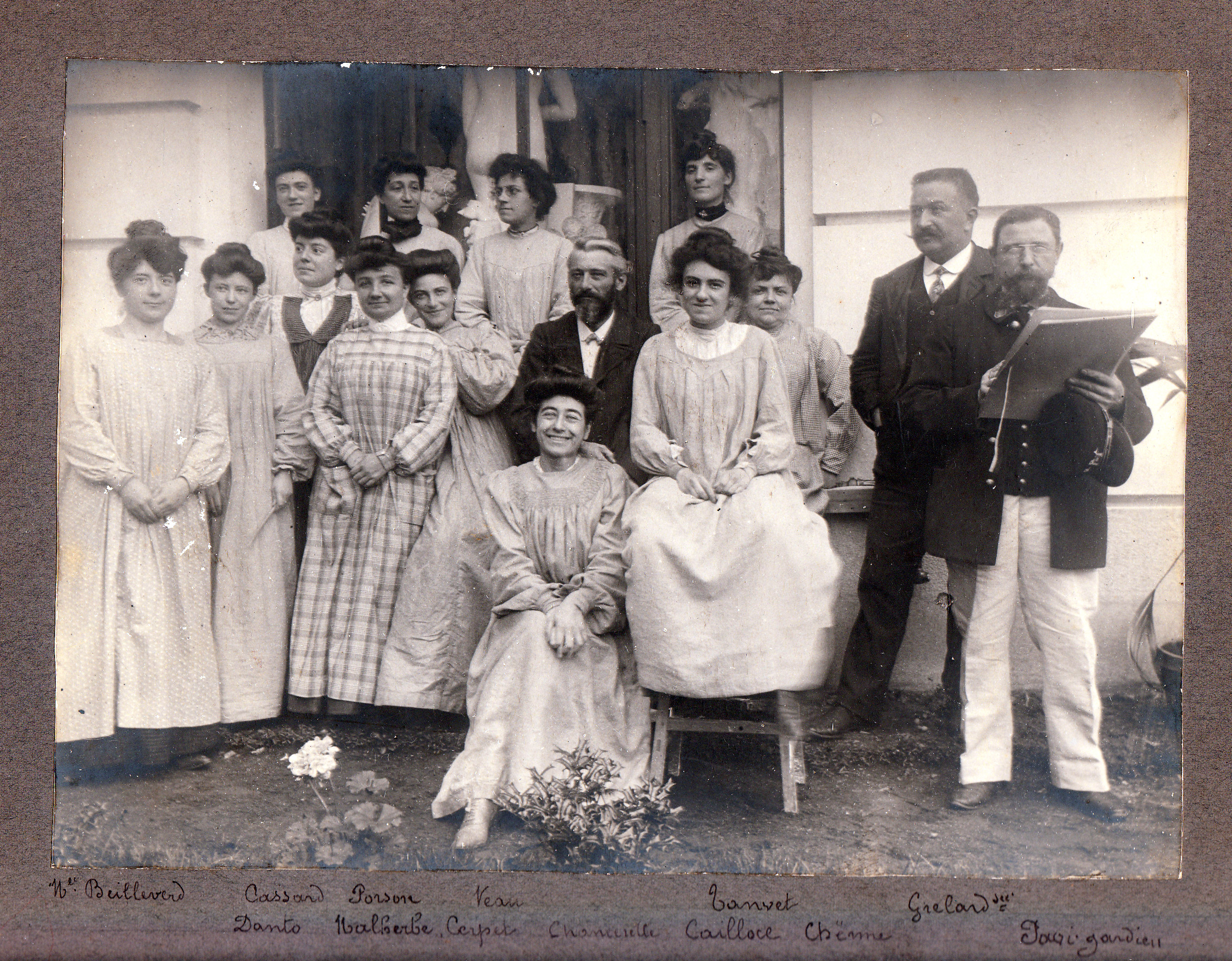 Emile Gaucher et ses élèves